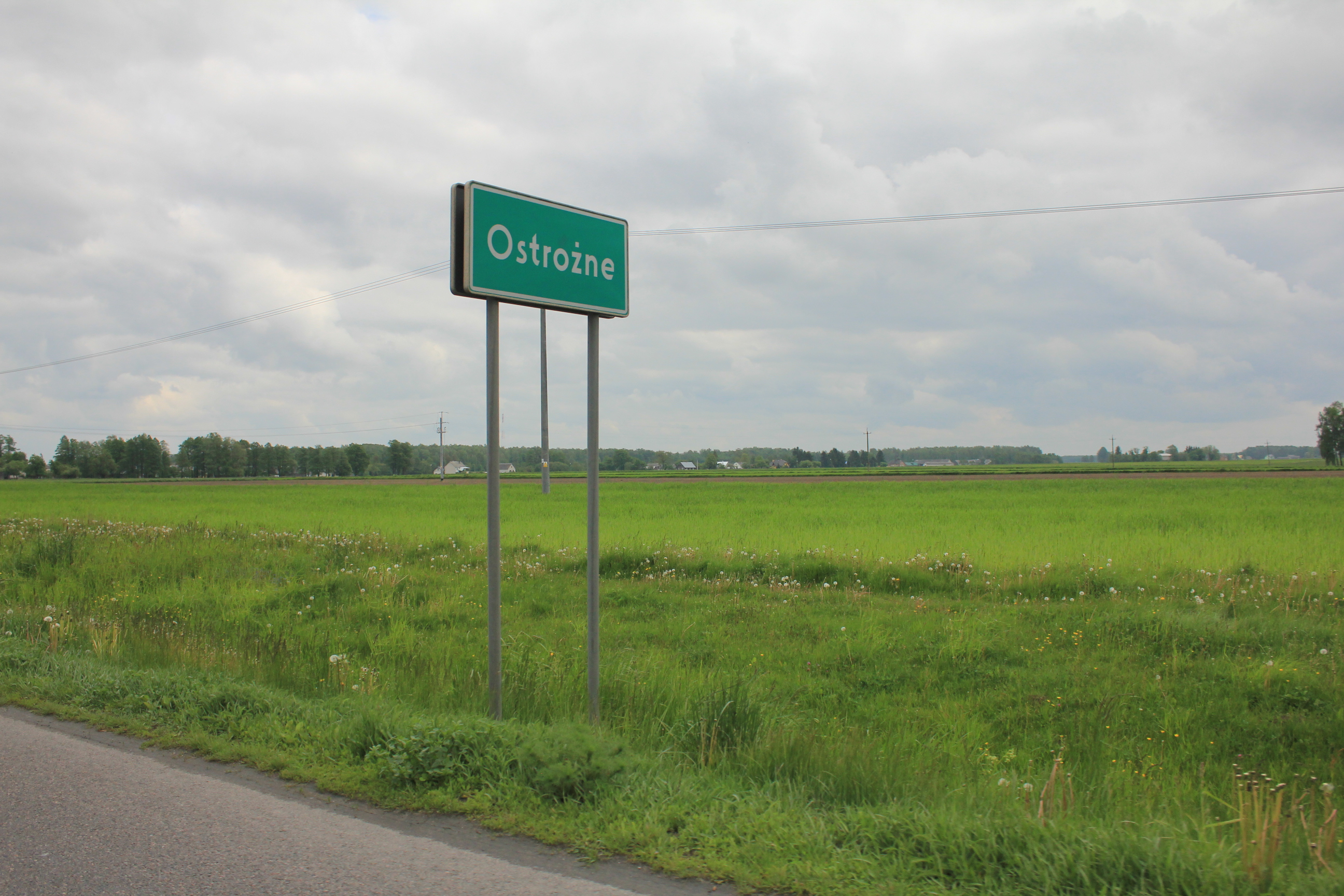 Ostrożne - wieś w Polsce położona w województwie podlaskim, w powiecie zambrowskim, w gminie Szumowo.